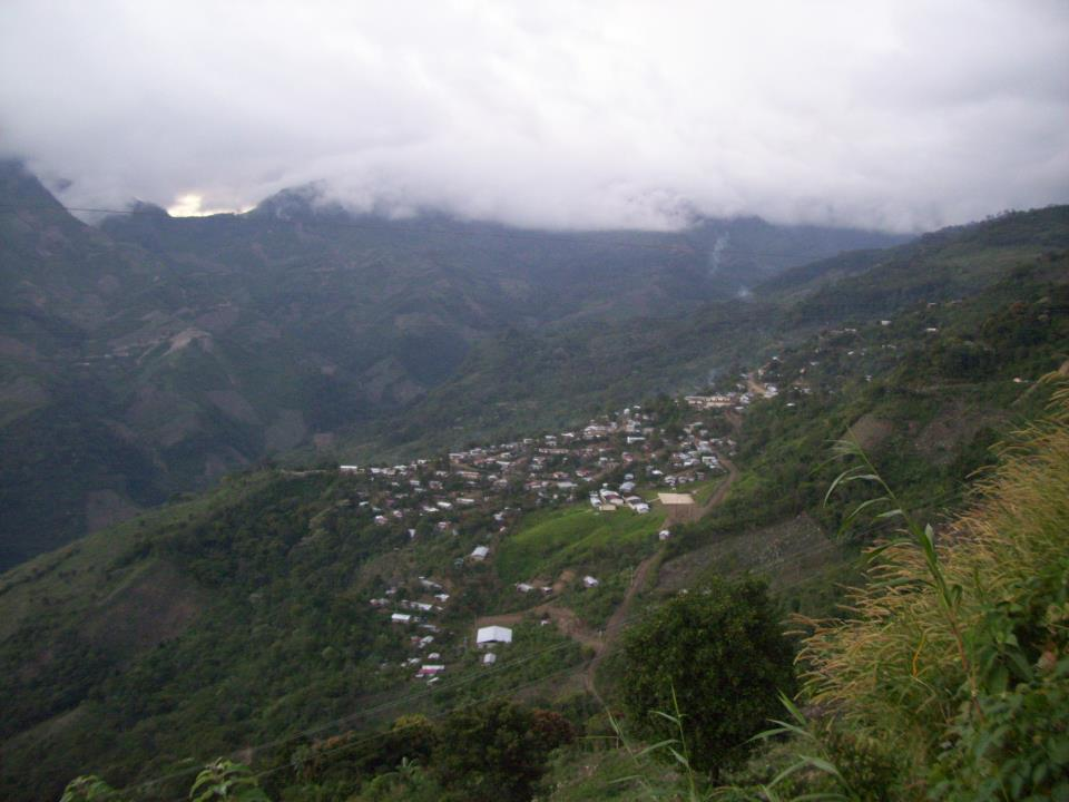 Vista panoramica de uno de los pueblos del hermoso municipio de Tila